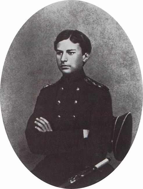 Василий Верещагин в период окончания Морского кадетского корпуса